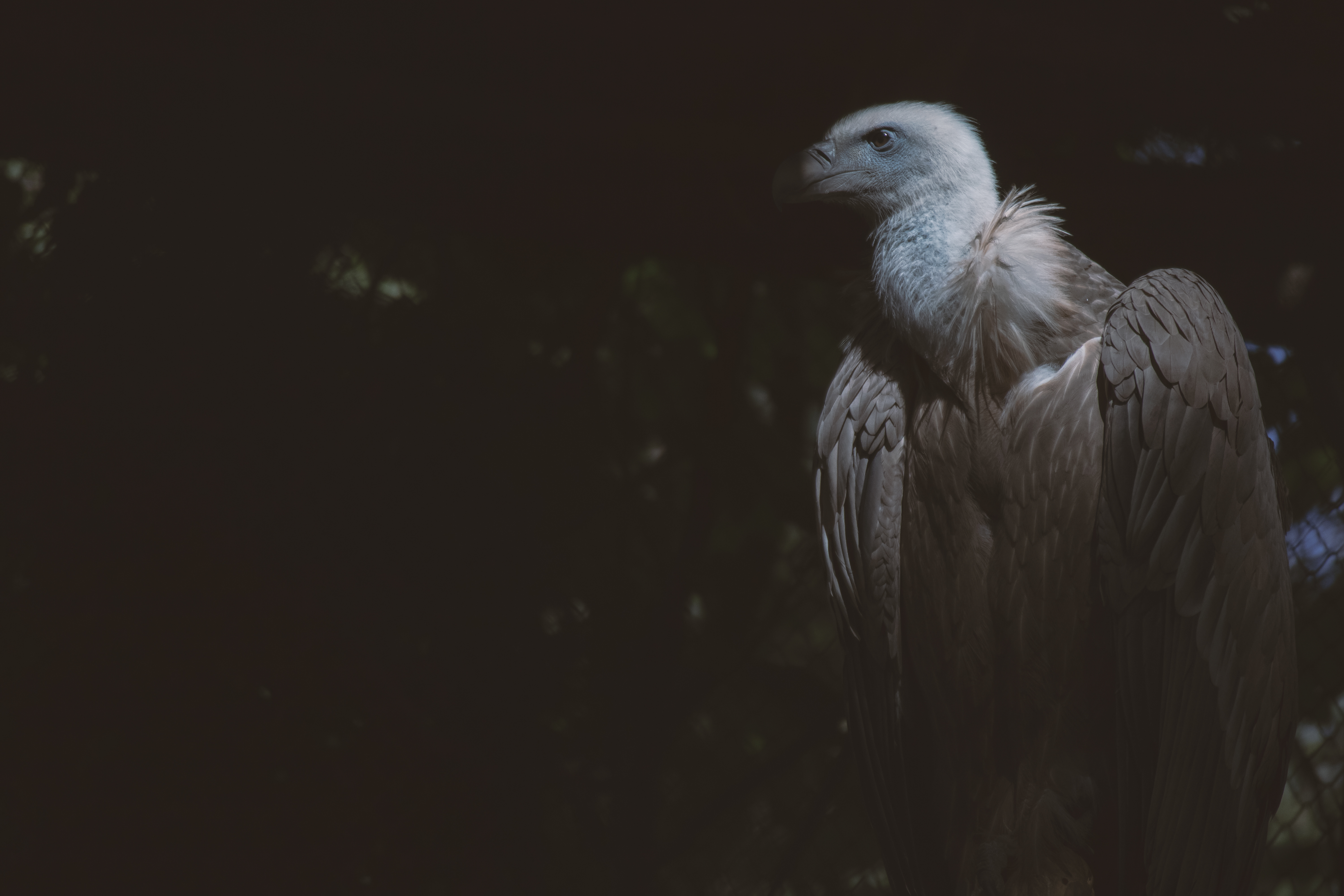 الحيوانات وتسمى أيضًا باسم "المَتْزَوِيّات" أي الحيوانات عديدة الخلايا. هي كائنات حقيقيات النوى ومتعددة الخلايا تشكل المملكة البيولوجية الحيوانية.